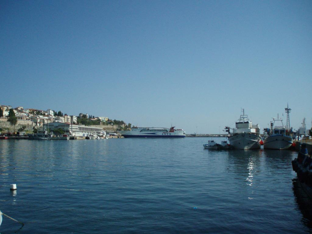 Ферибот, който отпътува от Кавала за о. Тасос